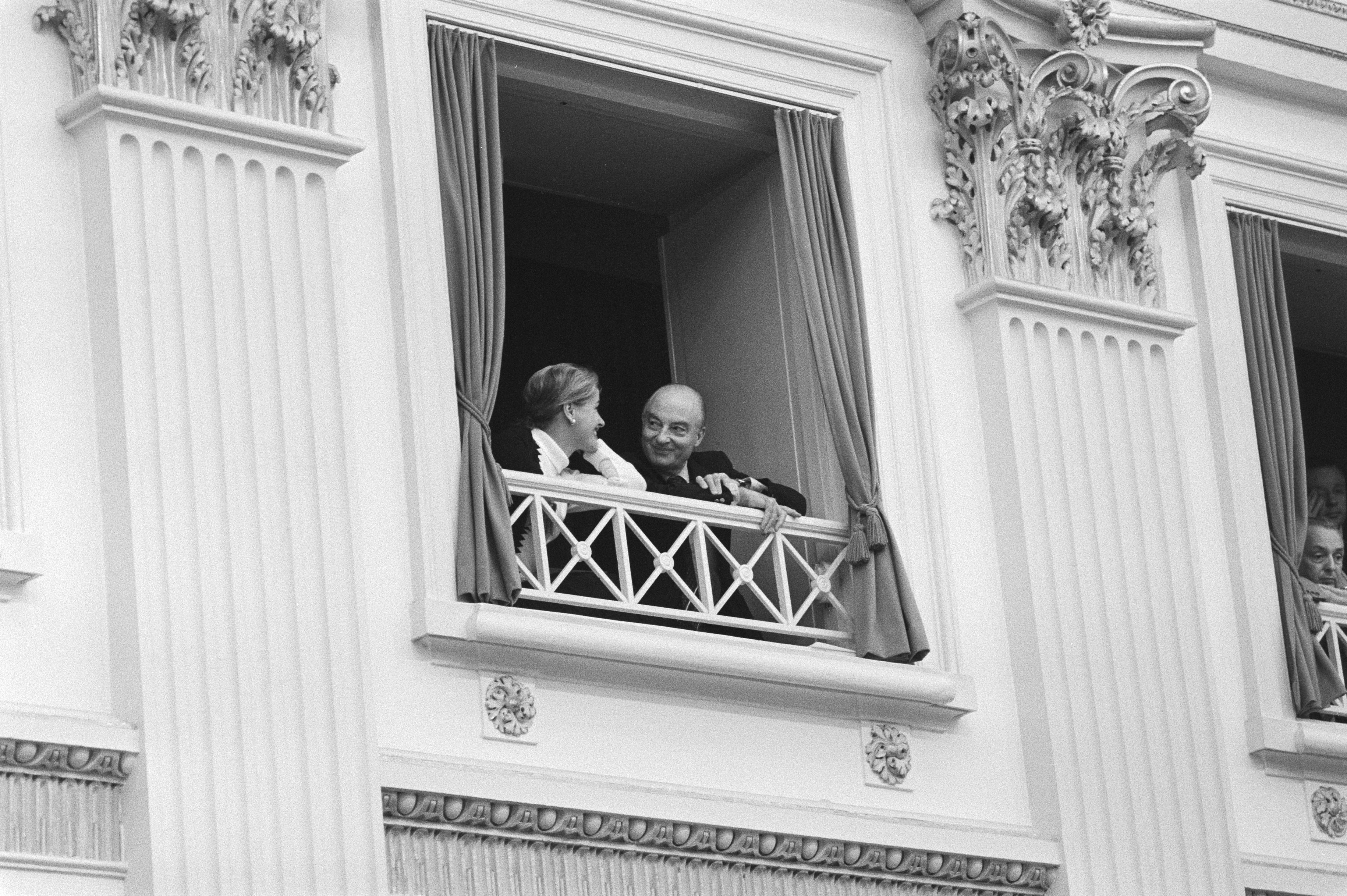 Collectie / Archief : Fotocollectie Anefo Reportage / Serie : [ onbekend ] Beschrijving : Algemene Beschouwingen, tweede ronde, Schmelzer met zijn vrouw in de loge Datum : 9 oktober 1980 Trefwoorden : BESCHOUWINGEN, loges, vrouwen Fotograaf : Antonisse, Marcel / Anefo Auteursrechthebbende : Nationaal Archief Materiaalsoort : Negatief (zwart/wit) Nummer archiefinventaris : bekijk toegang 2.24.01.05 Bestanddeelnummer : 931-0729